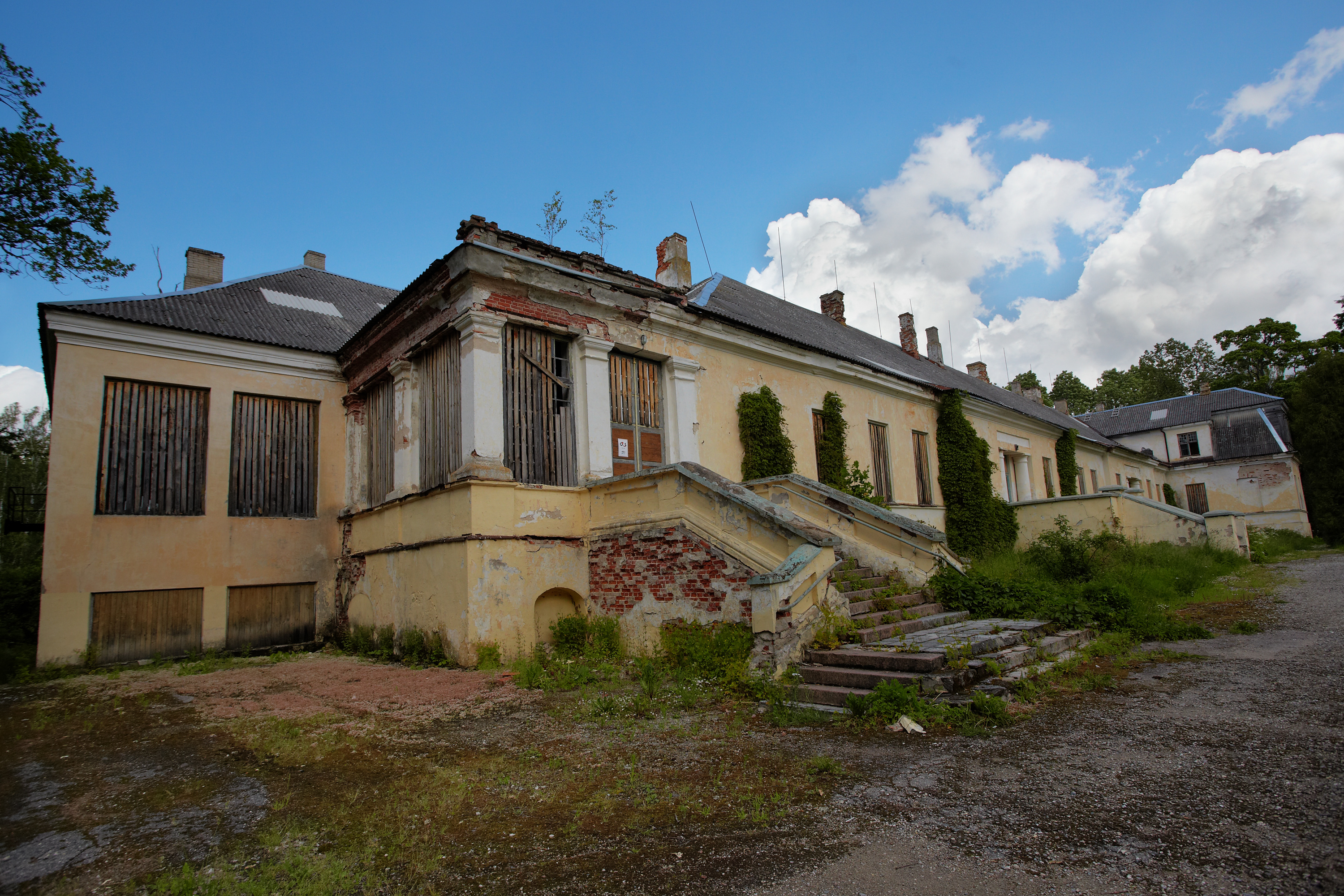 Vana-Antsla mõisa peahoone